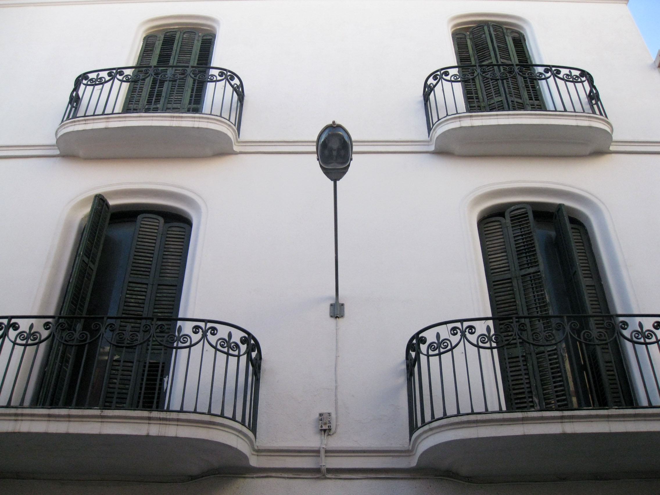 Casa Ramon Matalonga, al carrer de Topete núm. 68 (Terrassa). Edifici de Lluís Muncunill, del 1914. Detall de la façana, amb els balcons.